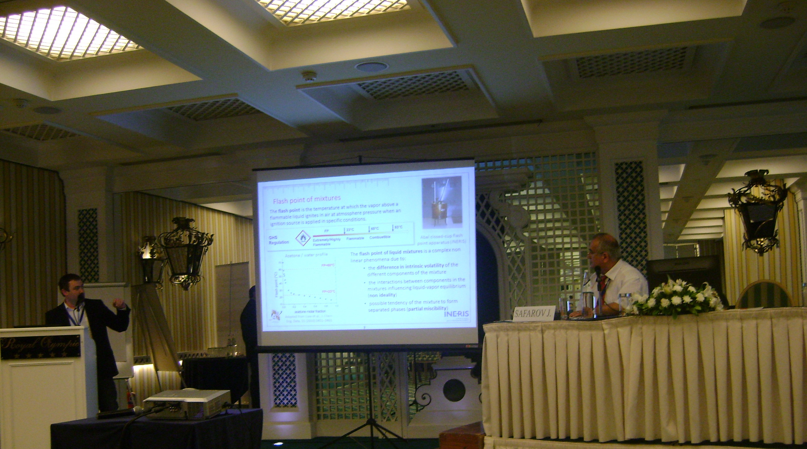 ESAT 2015 Afina Konfarns sedr